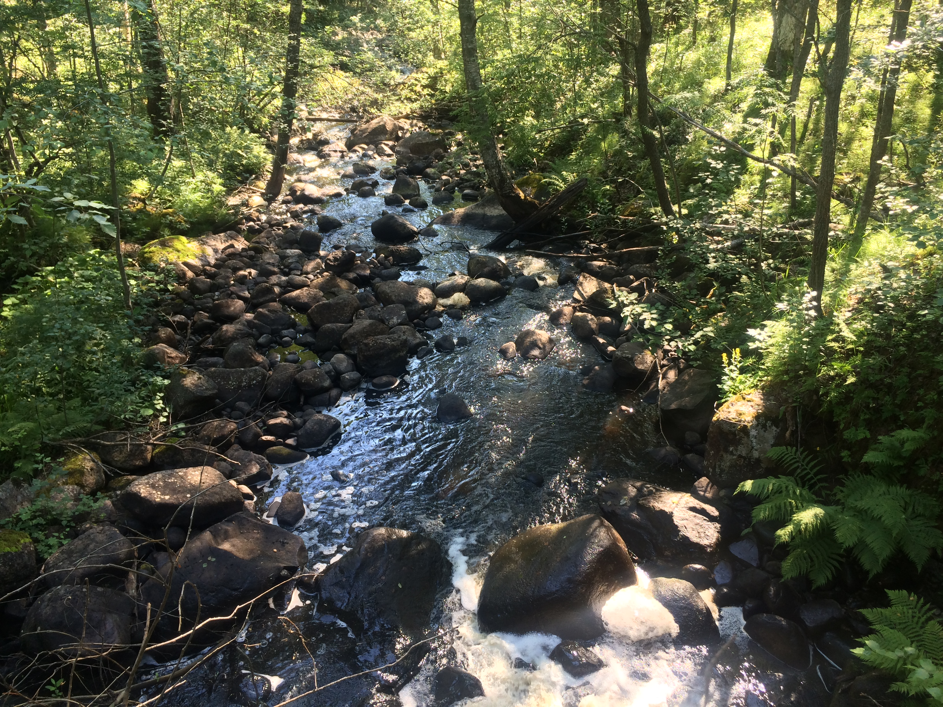 Эльмус (река)